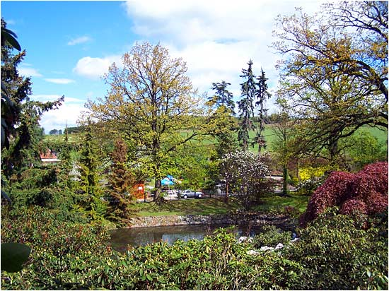 Arboretum w Wojsławicach, woj. dolnośląskie